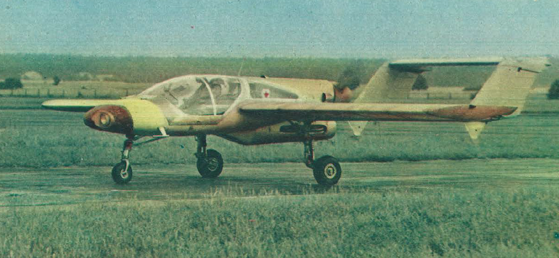 PZL M-17 na pasie startowym